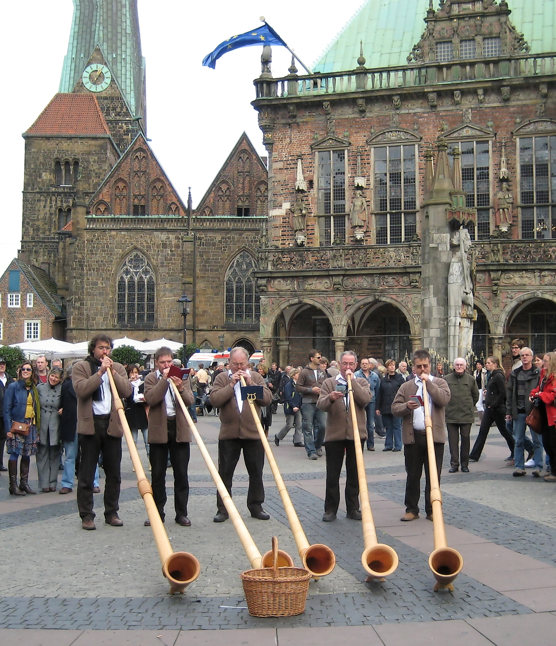 Alphornbläser-Gruppe aus der Schweiz auf dem Bremer Marktplatz. Fotoaufnahme beim Bürgerfest im Rahmen der offiziellen Feiern zum 20. Tag der Deutschen Einheit vom 1.–3. Oktober 2010 in Bremen. (Anmerkung: In dem Korb befindet sich das „CD-Angebot“ der Gruppe.)